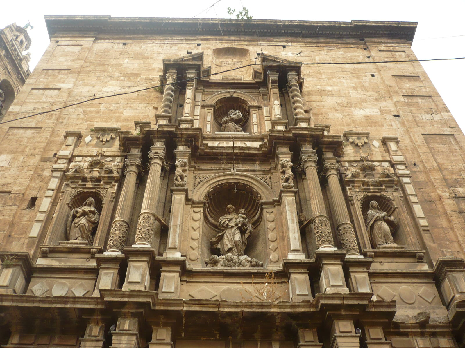 Iglesia del Carmen de Valencia, fachada.